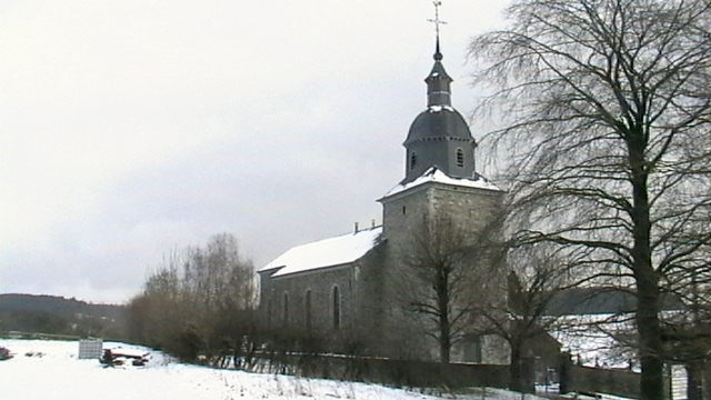 Walon: eglijhe di Cins veyowe did padvant